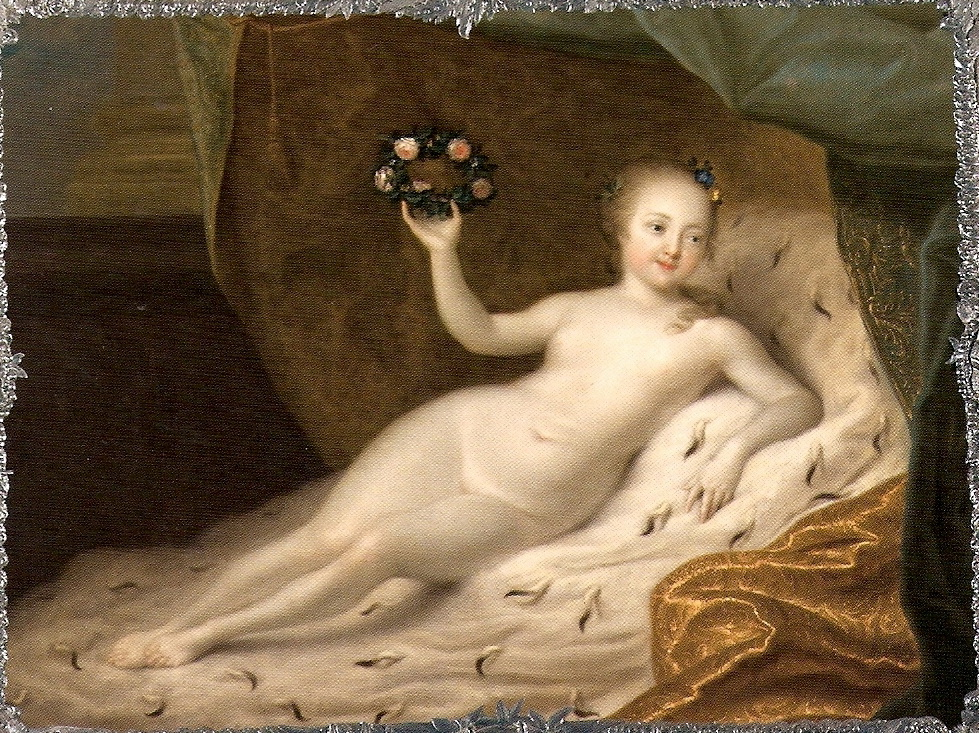 Георг Кристоф Гроот. Портрет императрицы Елизаветы Петровны в образе Флоры. 1747-1748